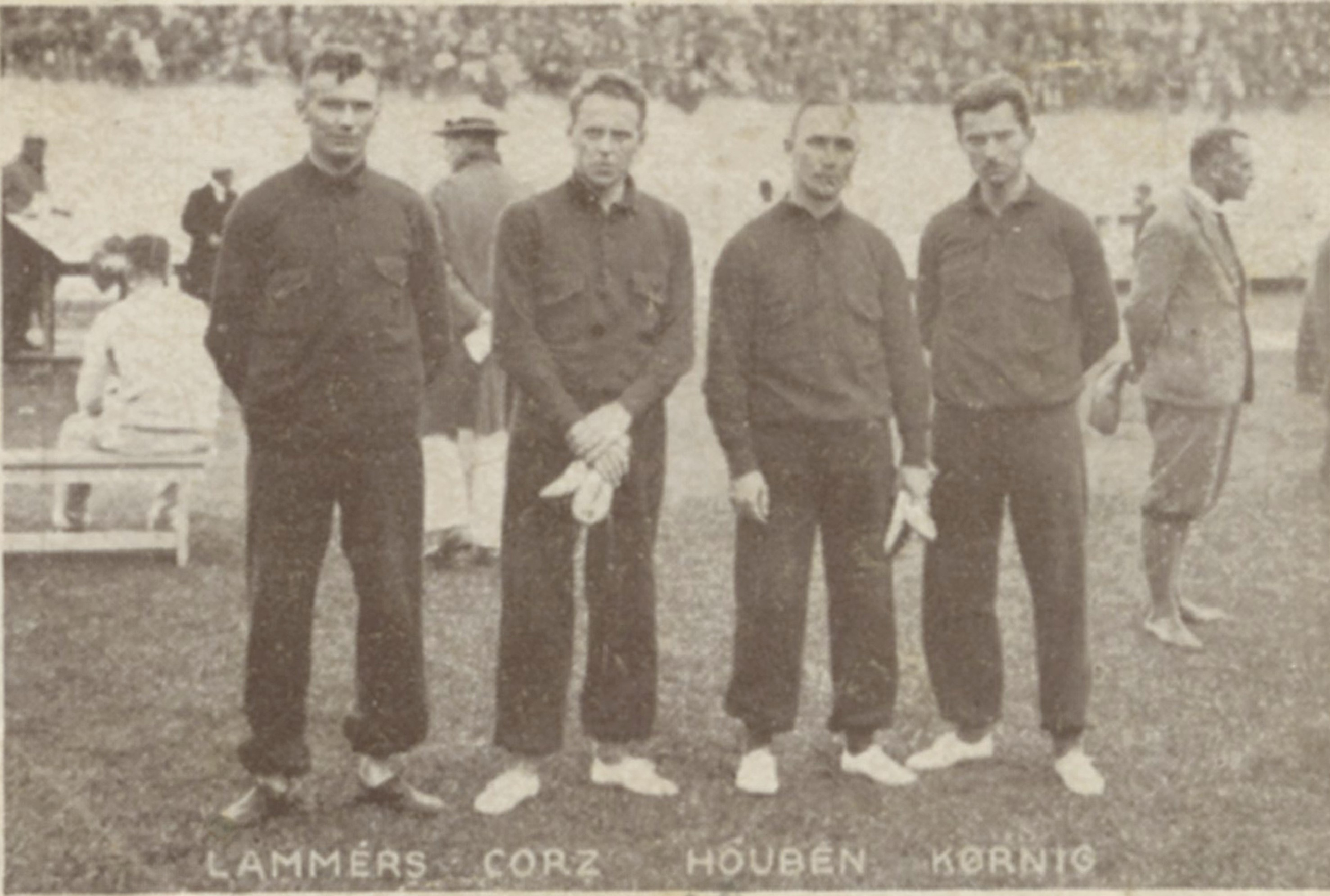 Format: Samlekort Dato / Date: 1928 (avfotograferingen), ca. 1930 (dokumentet) Fotograf / Photographer: Ukjent Wikipedia: Georg Lammers (1905 - 1987) Wikipedia: Richard Corts (1905 - 1974) Wikipedia: Hubert Houben (1898 - 1956) Wikipedia: Helmut Körnig (1905 - 1973) Eier / Owner Institution: Trondheim byarkiv, The Municipal Archives of Trondheim Arkivreferanse / Archive reference: Sportsklubben Freidig: Sigarettfoto ca. 1930 (Løpenr. 75) F23912 Tekst på baksiden: Det tyske stafetlag i 4 x 100 metersløp. Fra venstre Lammers, Corz, Houben og Körnig. Laget plasserte sig som nr. 2 efter det amerikanske lag. Forøvrig blev Lammers nr. 3 i 100 meters løp og Körnig nr. 3 i 200 metersløpet. Merknad: Disse samlekortene med bilder av norske og internasjonale idretthelter fulgte med i sigarettpakker på 1920 og 30-tallet - derav tobakksreklamen på baksiden. Samlekortene kommer fra Sportsklubben Freidigs arkiv, og inneholder nærmere 90 unike kort pent plassert i et samlealbum. Samleren var den senere skipsmegler Finn Følling (1914 – 1985).